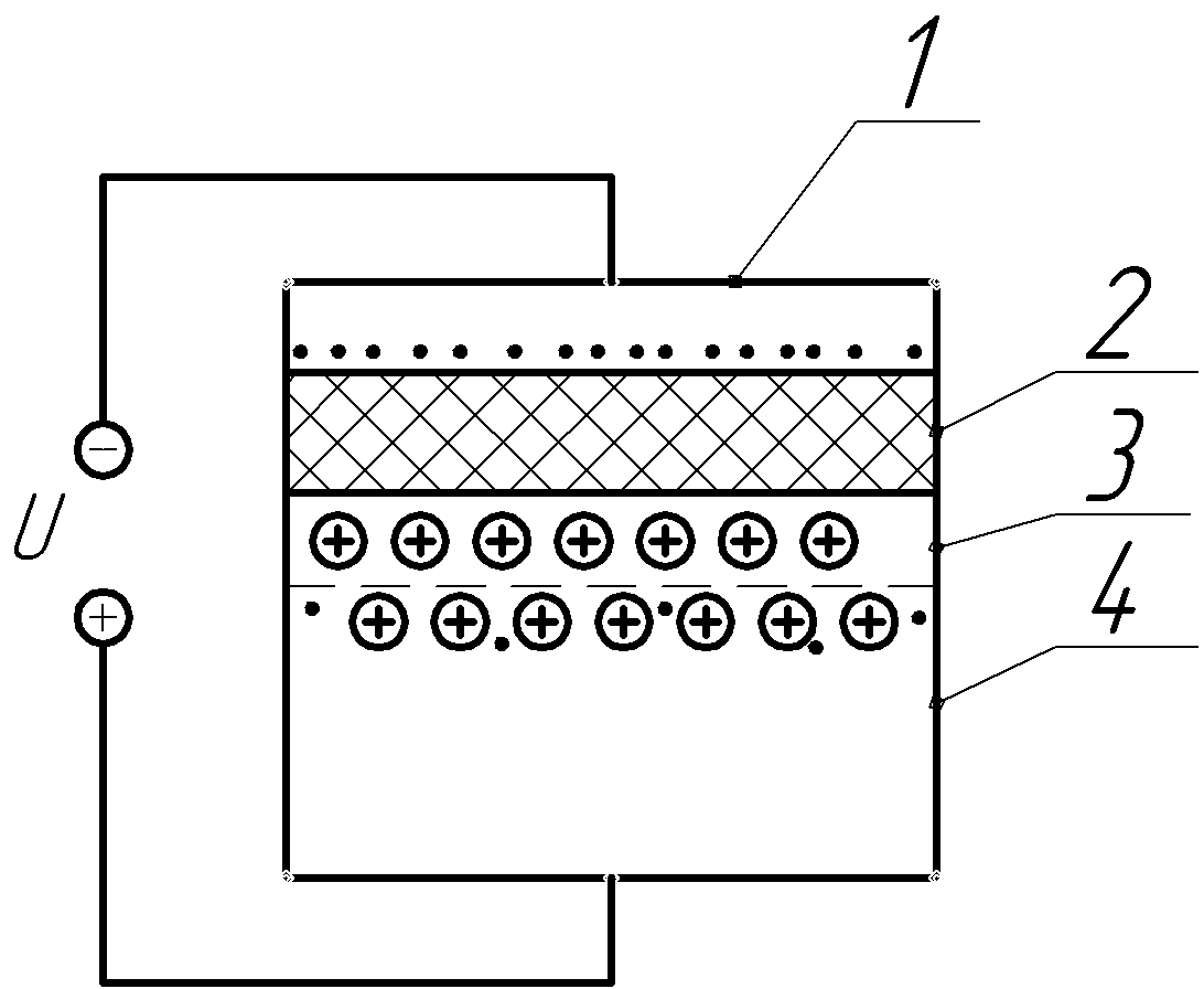 Обедненный слой в полупроводнике n-типа. 1 - металл, 2 - диэлектрик, 3 - обедненный основными носителями слой, 4 - полупроводник n-типа